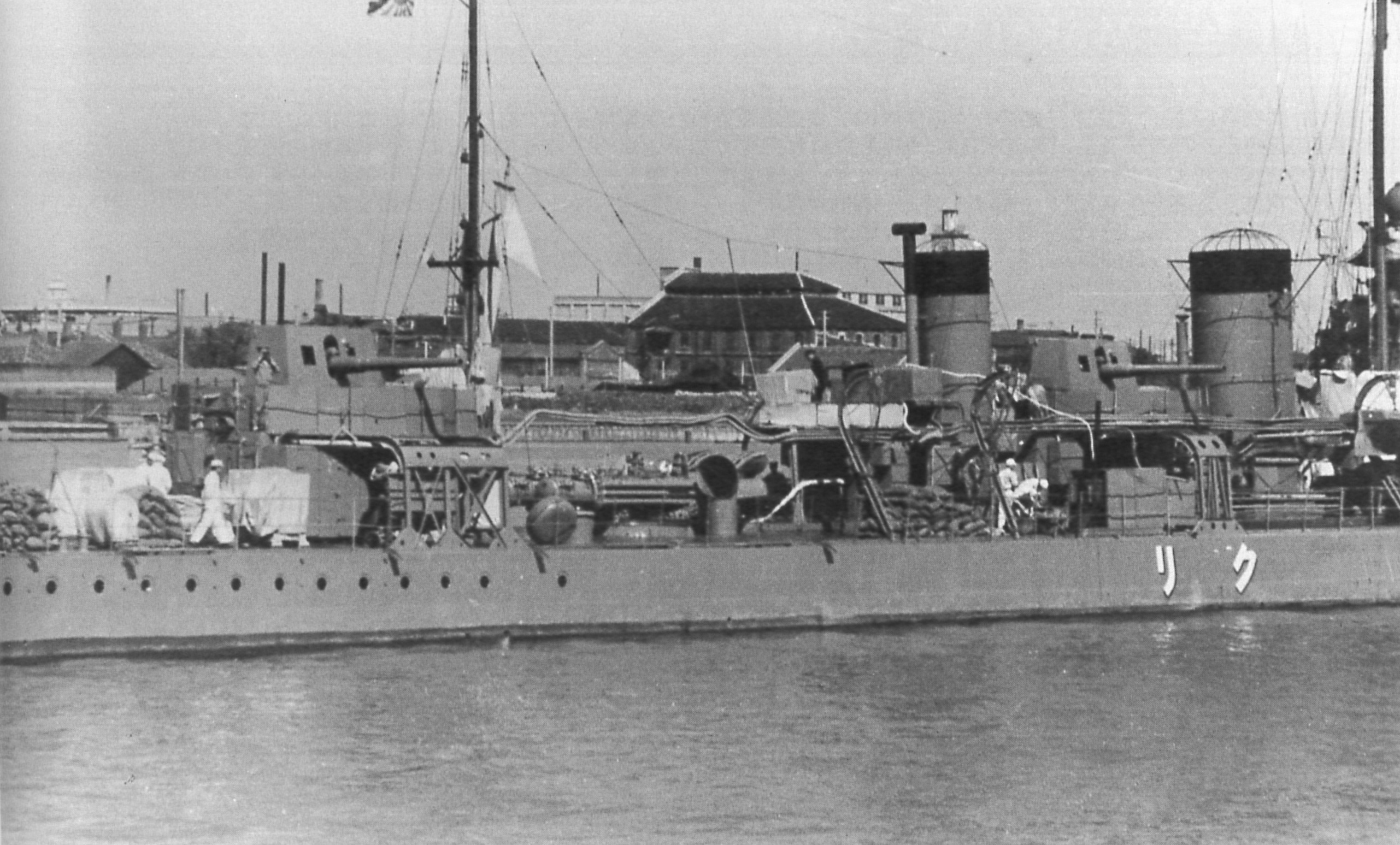 第二次上海事変に出動した昭和12年後半と思われる｢栗｣